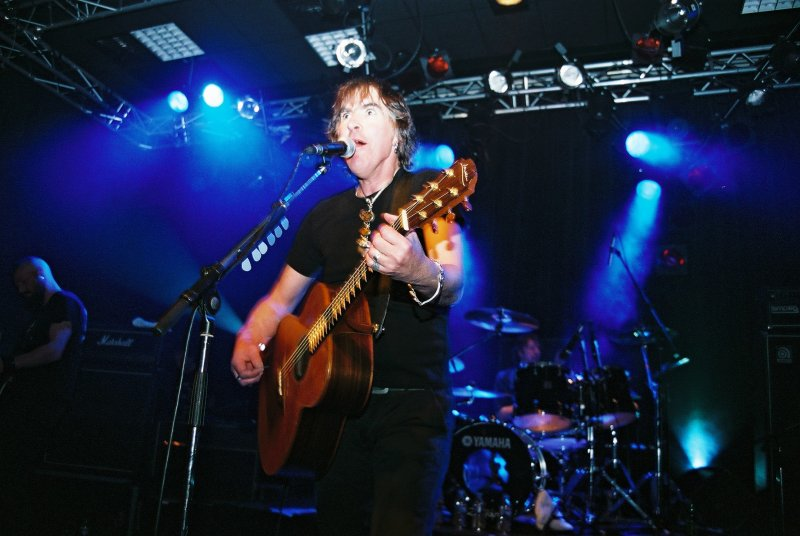 New Model Army en concert au Big Band Café, Caen/Hérouville Saint-Clair